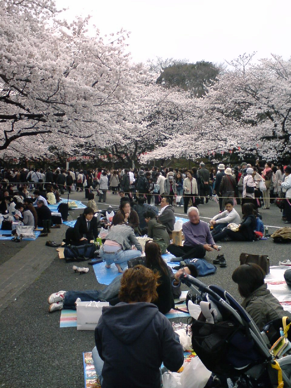 2008年3月27日、東京・上野で撮影。個人が特定できないようにぼかしを入れた。